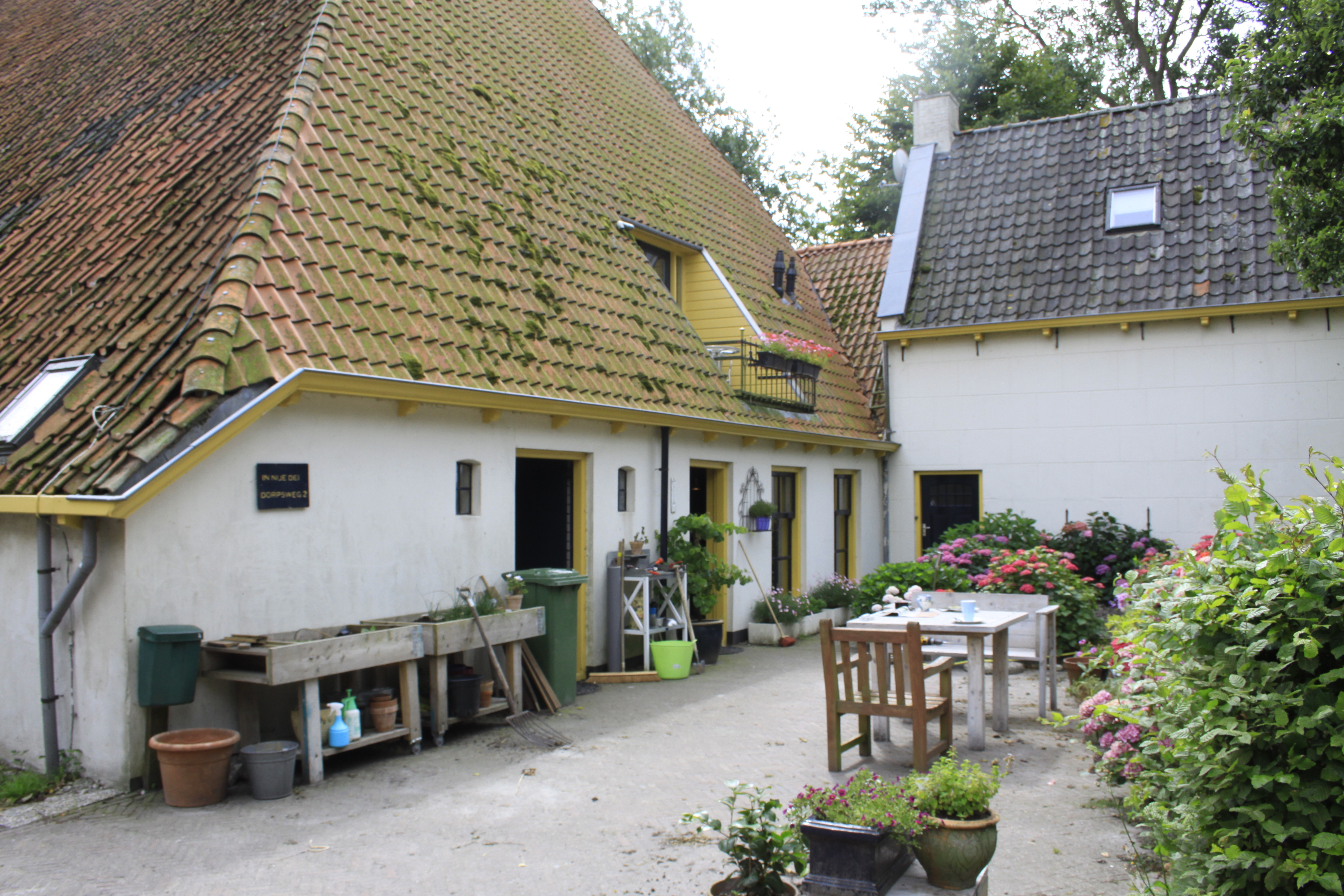 In de gemeente Sudwest-Fryslân in de provincie Friesland ligt het dorp Idsegahuizem.